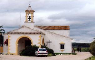 Fachada Ermita de la Ina